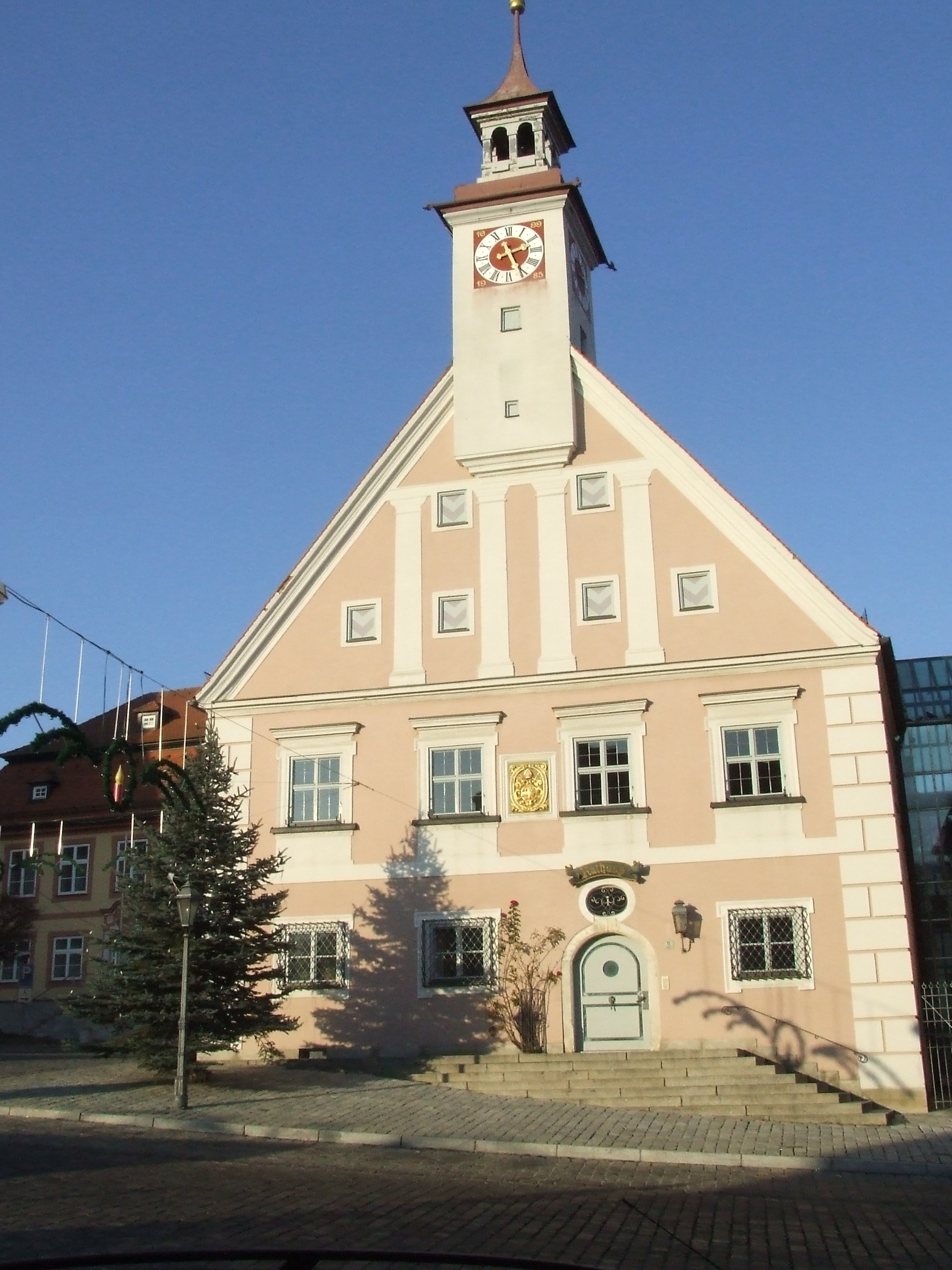 Historisches Rathaus der Stadt Greding, Bayern